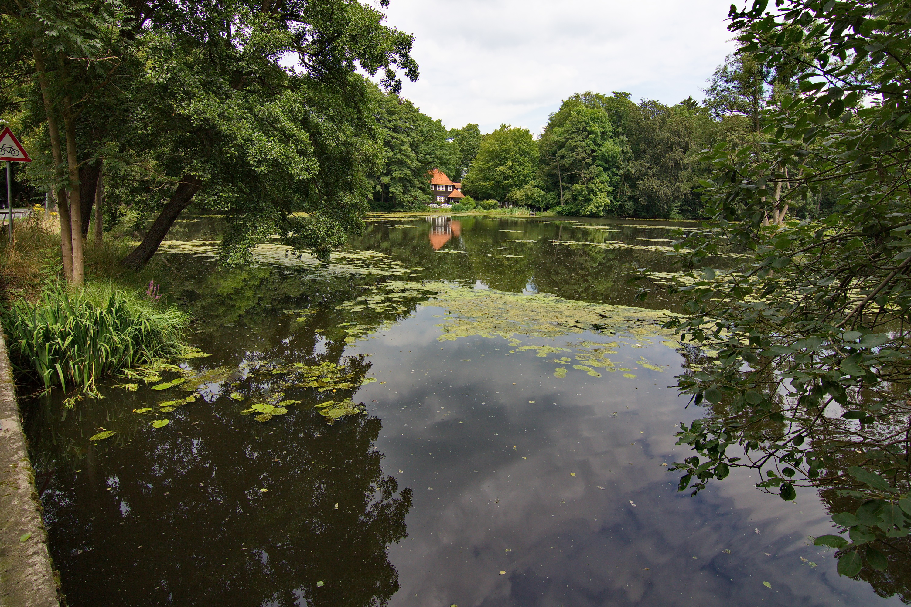 Mühlteich der Wassermühle in Lünzen (Schneverdingen), Niedersachsen, Deutschland